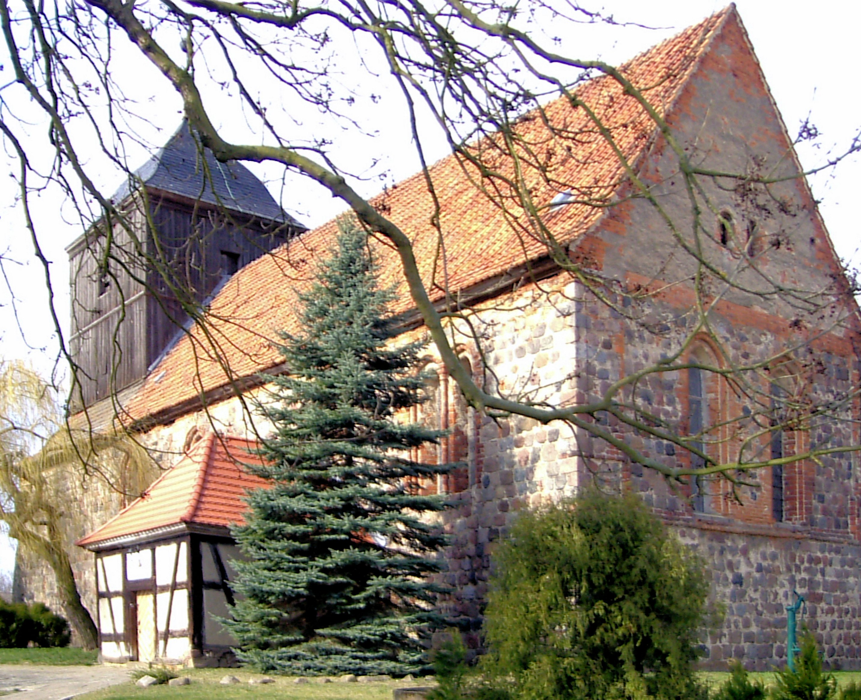 Dorfkirche Golm, Gemeinde Zichow